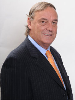 Roberto Delmastro Naso